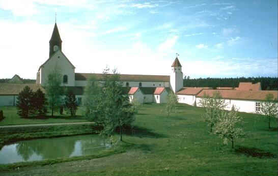 Marienau